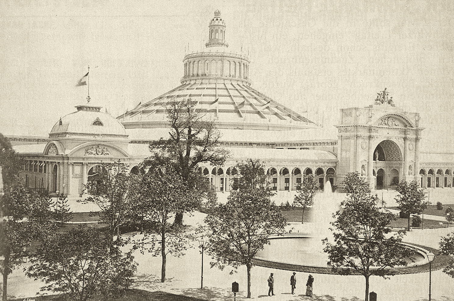 Wien, Rotunde, zeitgenössische Ansicht um 1873